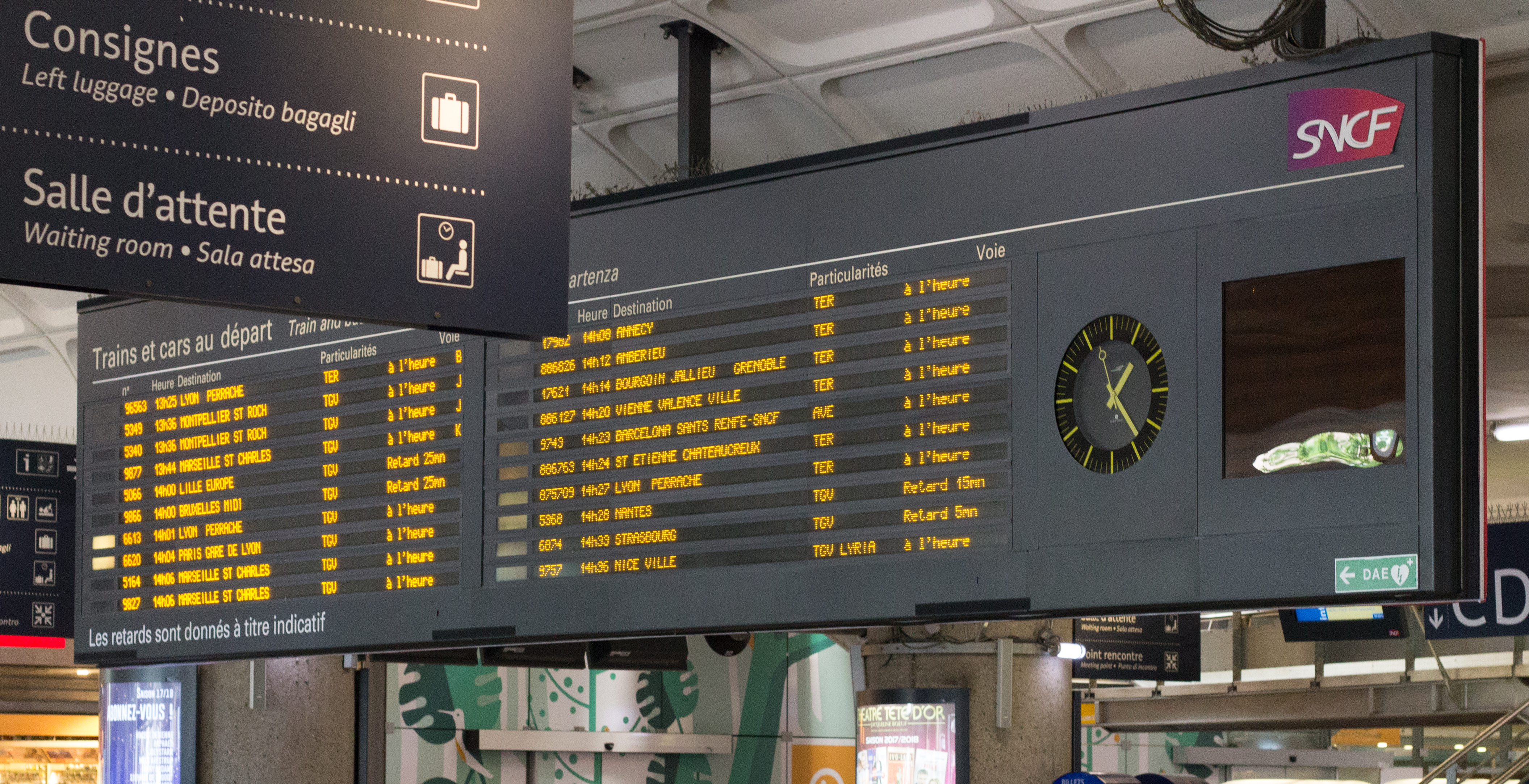 Tableau d'annonce des départs de trains et cars à la gare de Lyon Part Dieu